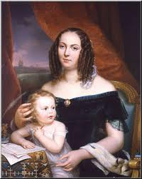 Portrait de Louise Colet et de sa fille Henriette